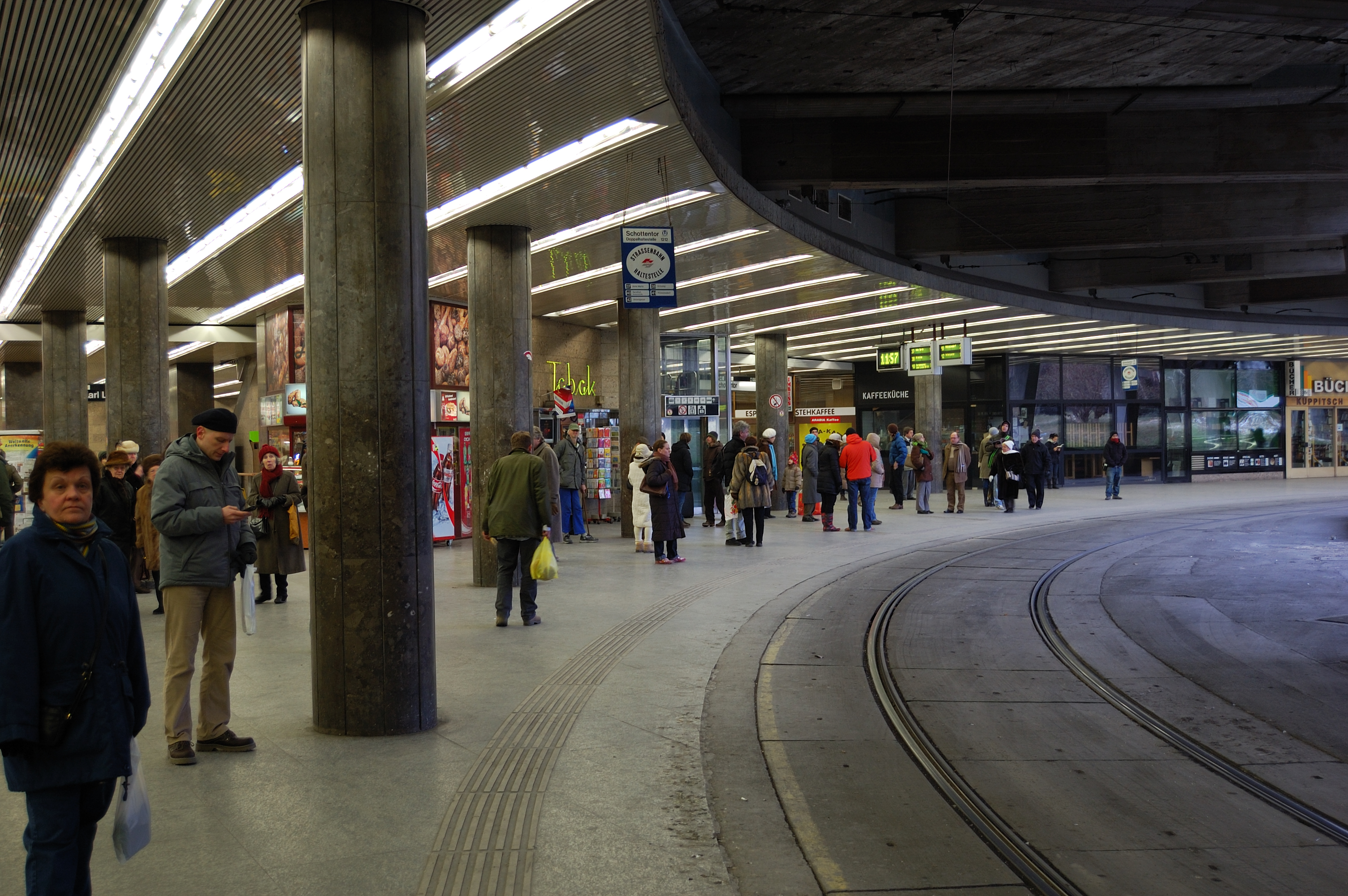 Schottentor